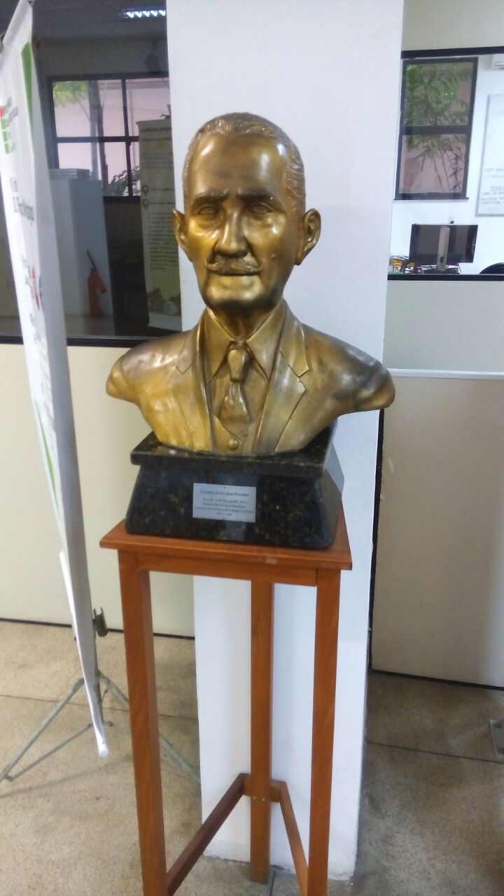 Busto de Josino José Ferreira primeiro diretor do atual Instituto Federal do Piauí. Fica na biblioteca do campus central em Teresina.